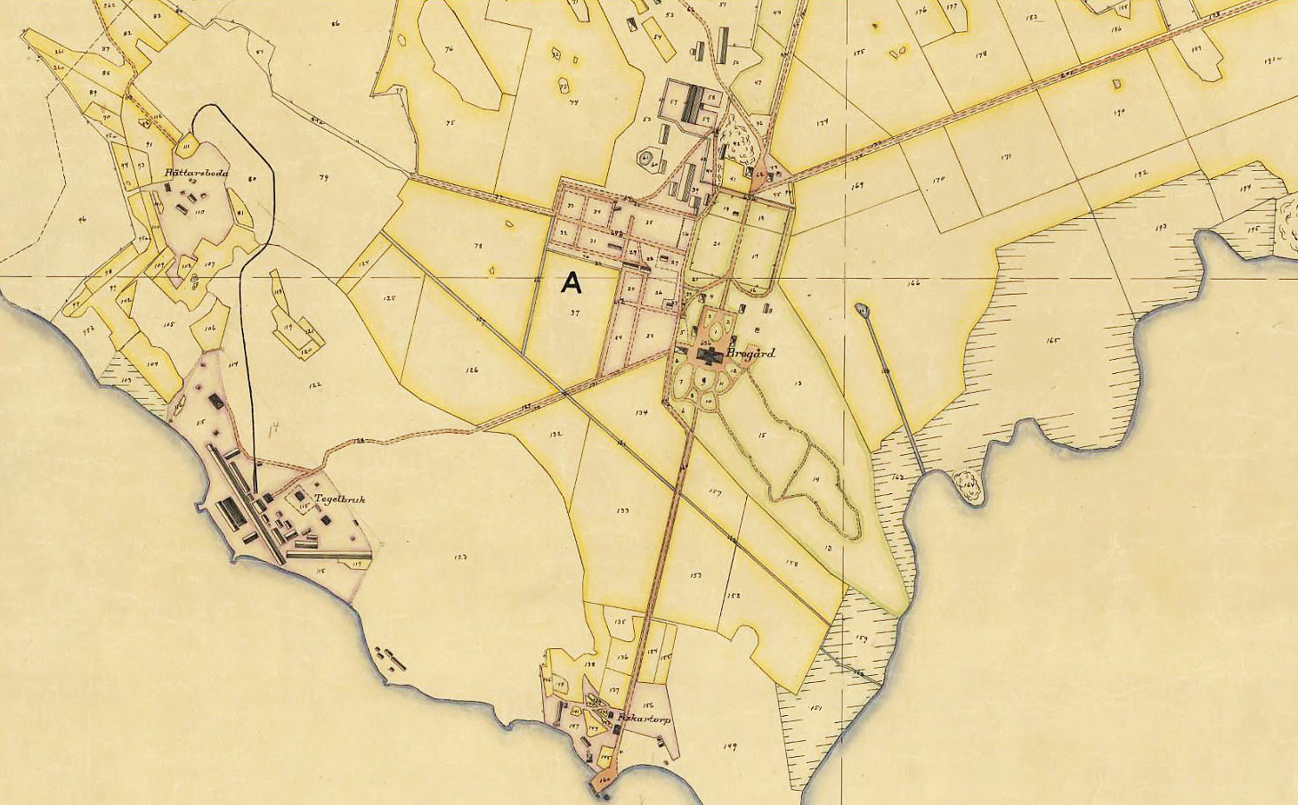 Karta över Brogård och Brogårds tegelbruk